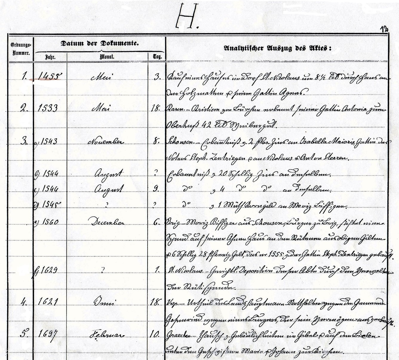 Kanton Wallis, Bezirk Visp, Inventar der Archive Pfarrgemeinde von St. Niklaus VS, Wallis, Schweiz, H. verschiendene Dokumente, 15. August 1886.